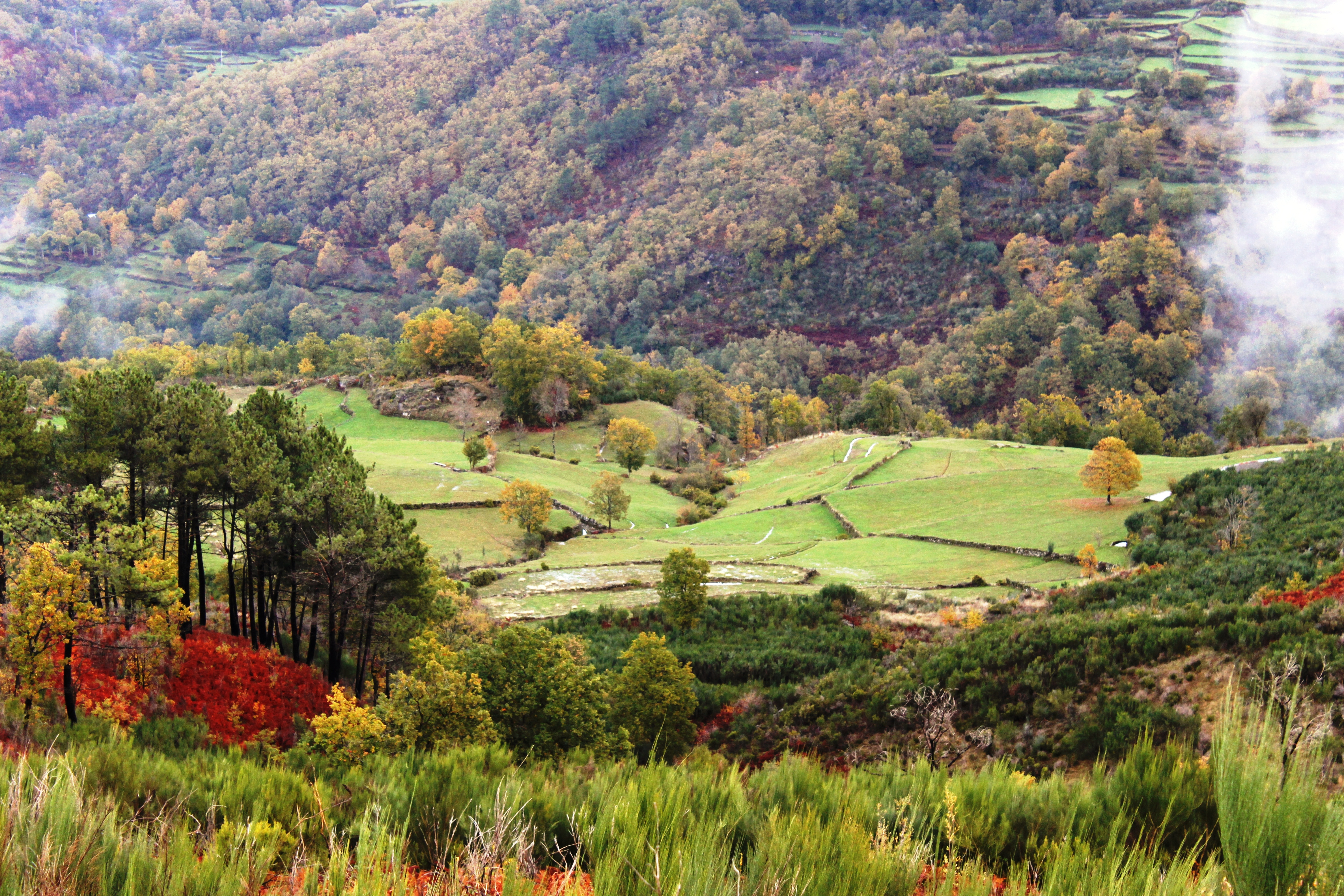 Base da Serra do Montemuro - Cinfães